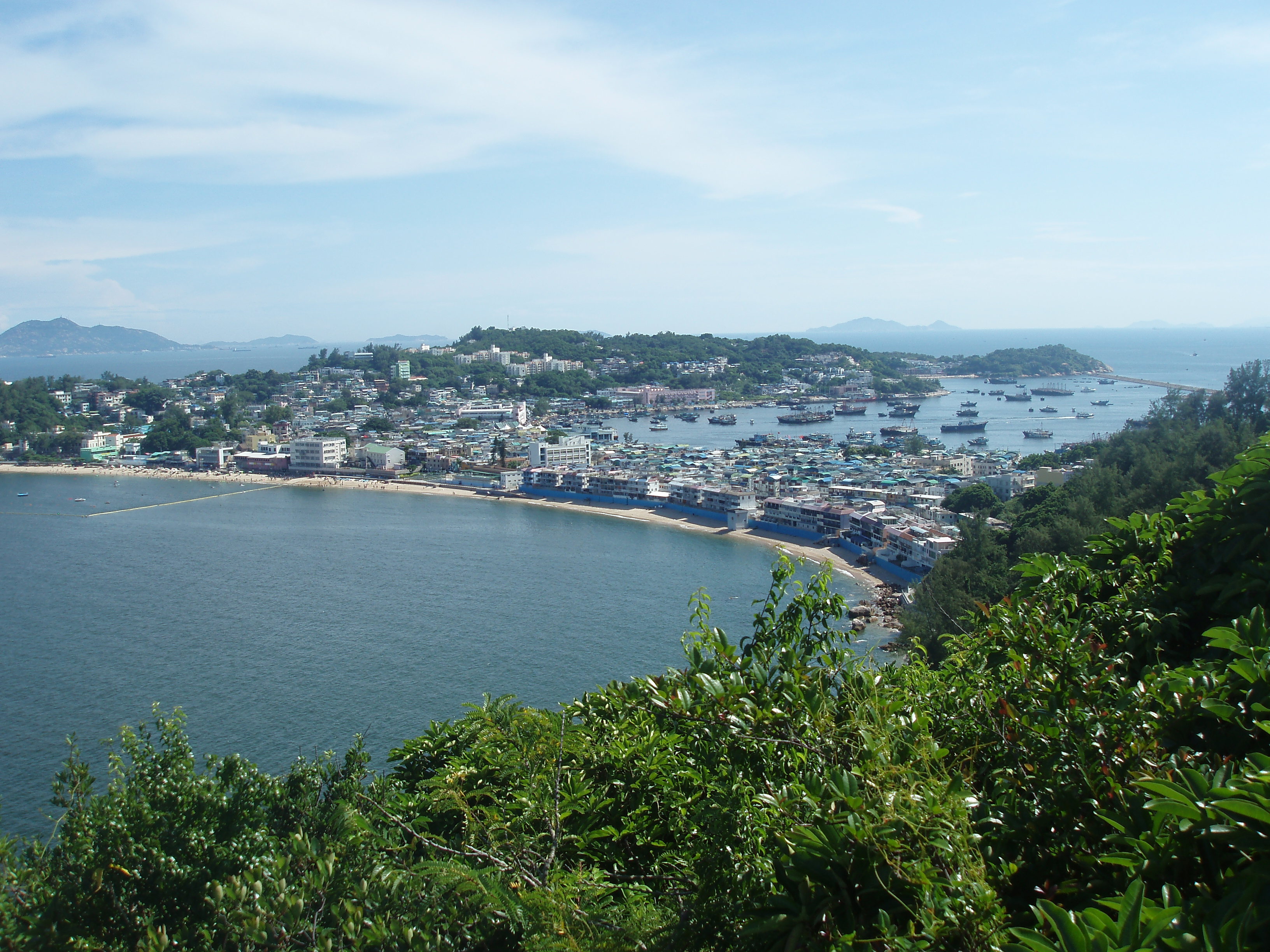 Blick auf Cheung Chau vom Inselnorden gen Süden